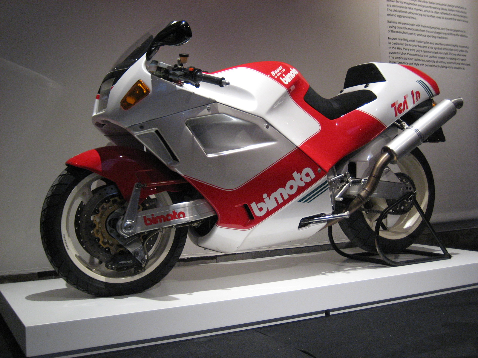 Bimota Tesi 1D 906 SR